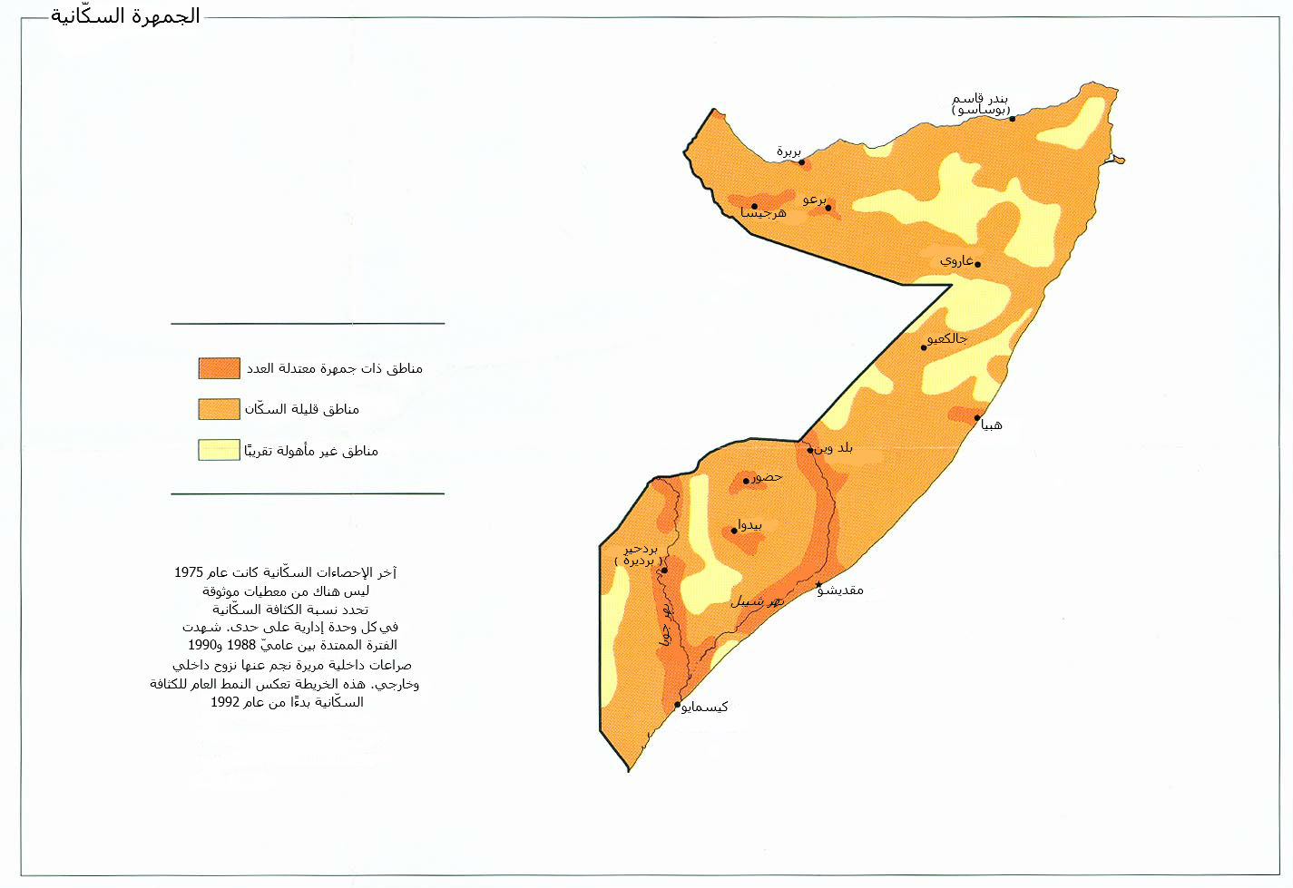 الجمهرة السكانية في الصومال حتى عام 1992